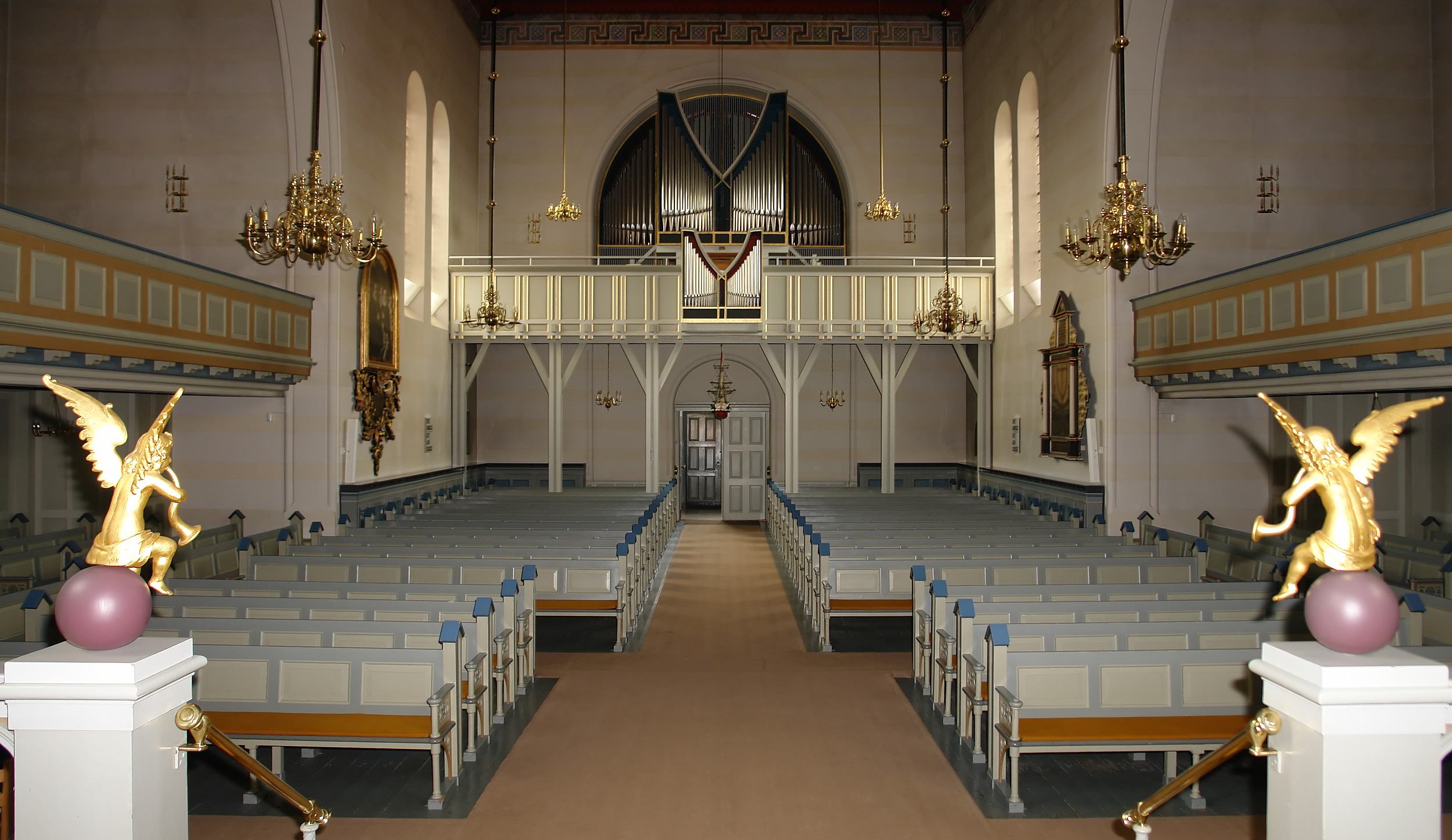 Nikolai Kirche Holbæk, DK: Hauptorgel mit 41 Registern, 3 Manualen, 1 Pedal und Rückpositiv gebaut 1967 bei Th. Frobenius & Sønner